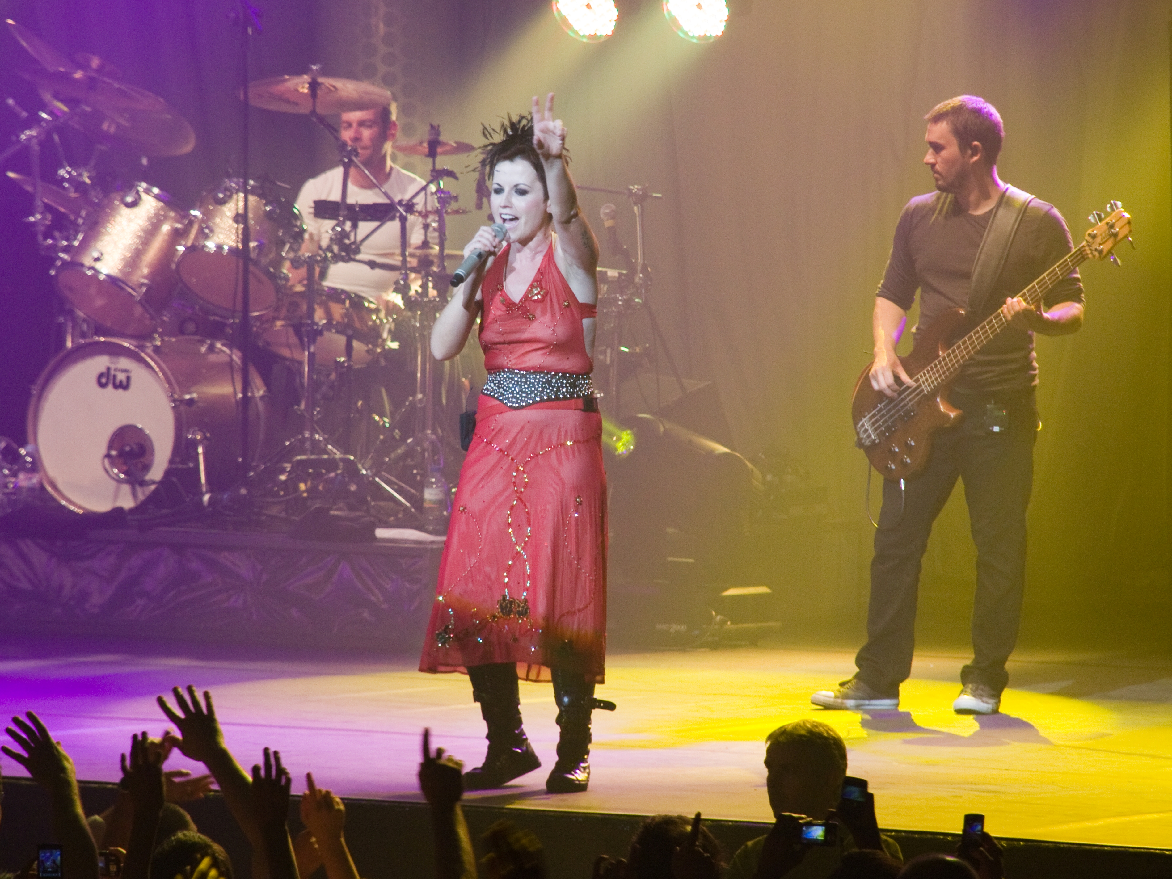 Concert des Cranberries au Zenith de Paris, le 31 mai 2010